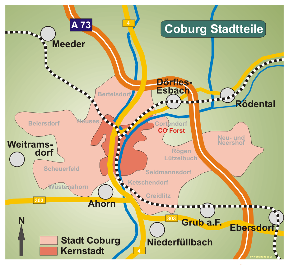 Karte von Coburg, Stadtteil Coburg Forst